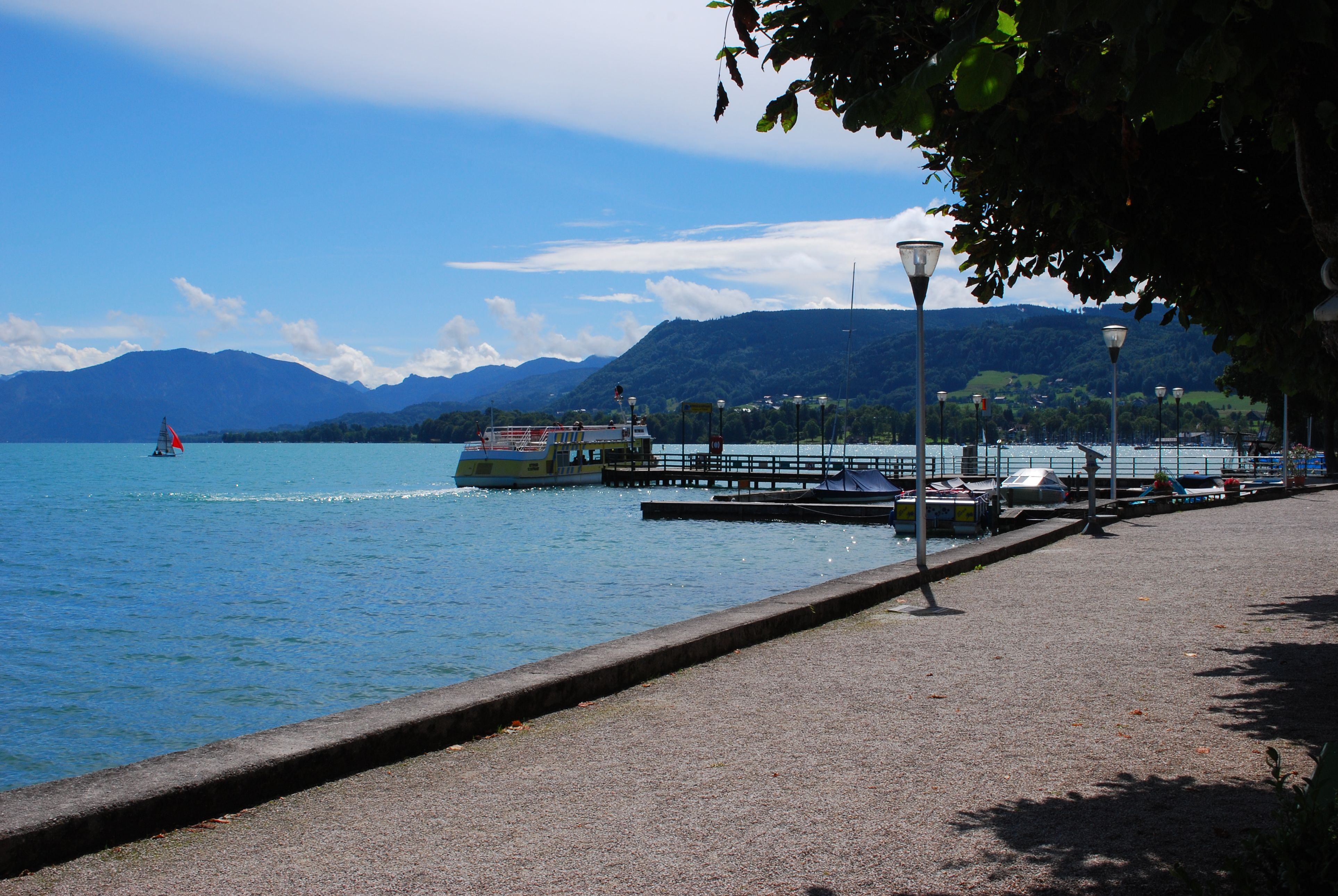 Strandpromenade in Attersee am A.